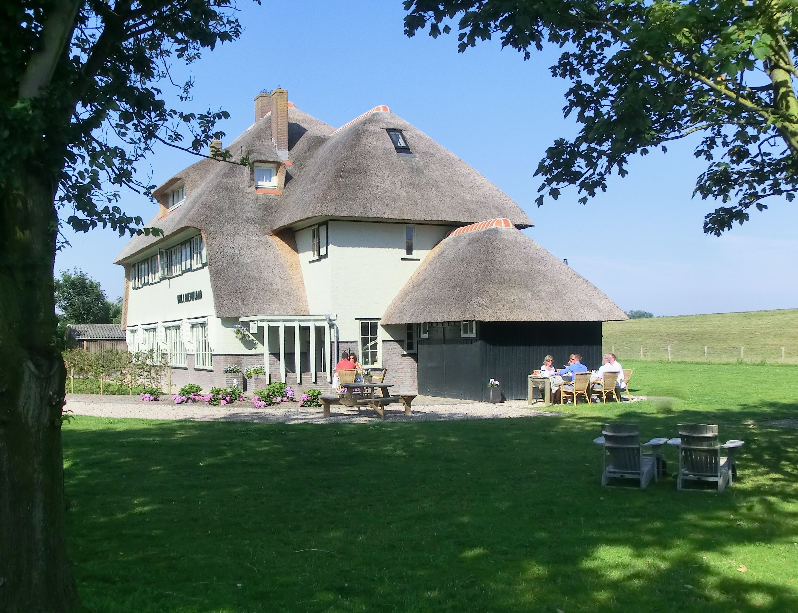 Villa Nieuwland in Den Oever, gebouwd voor de hoofdingenieurs die bouwden aan de Afsluitdijk, is in 2011 volledig gerenoveerd en op deze foto recent in gebruik genomen als bed & breakfast.